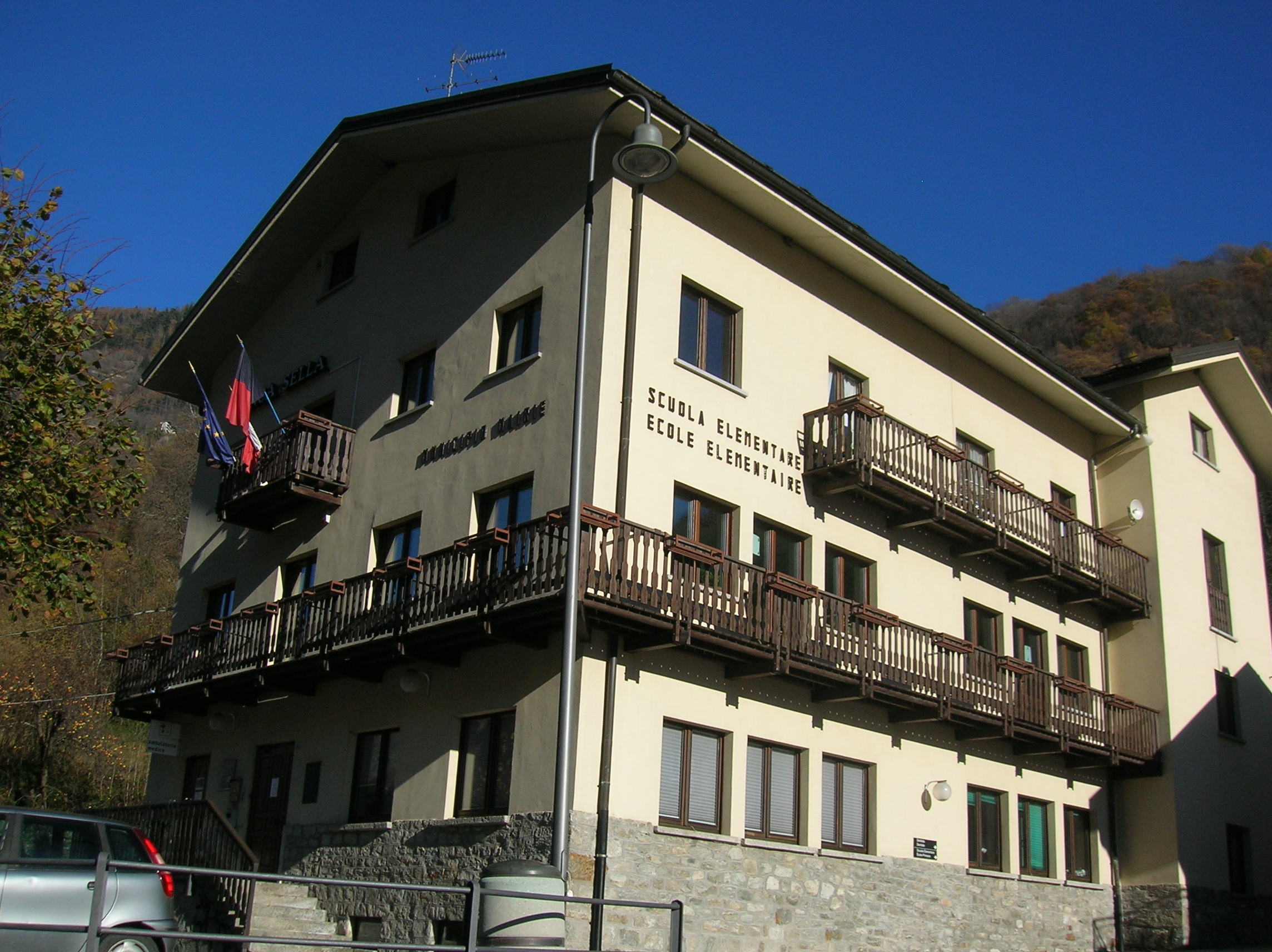 municipio di Fontainemore, Valle d'Aosta, Italia.